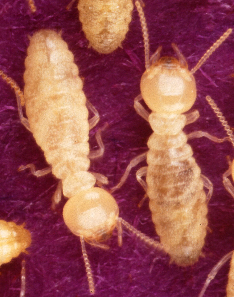 Coptotermes formosanus shiraki; Formosan subterranean termites(Termite), イエシロアリ(シロアリ)